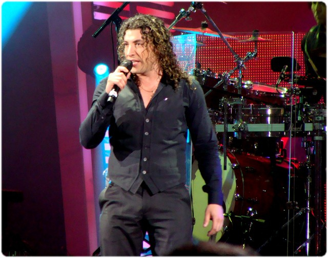 Su ultima presentacion de Leo Rey junto a la Noche en el Festival de Viña 2010